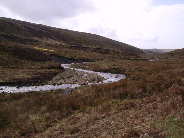 River Calder